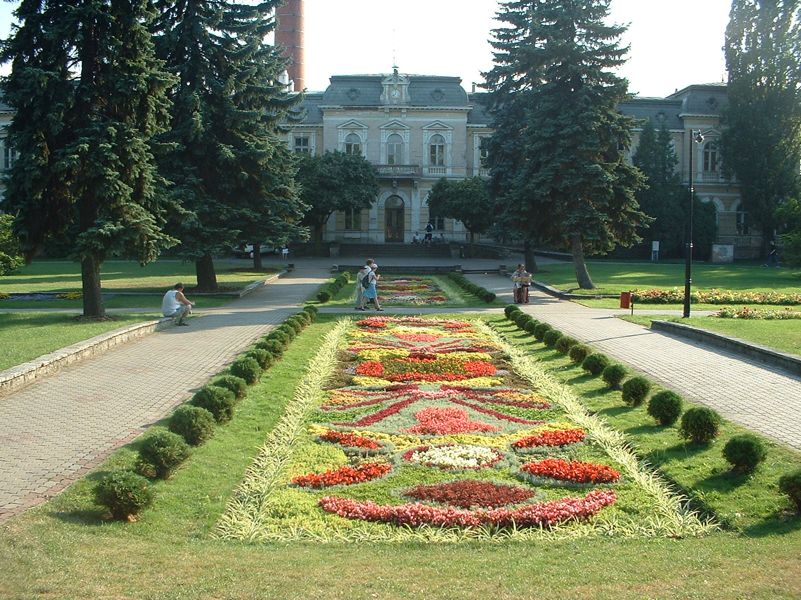 Park Zdrojowy w Ciechocinku